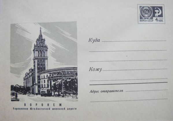 ХМК 1970 г. Мурманск. Плавательный бассейн